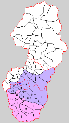 山形県南村山郡の町村。